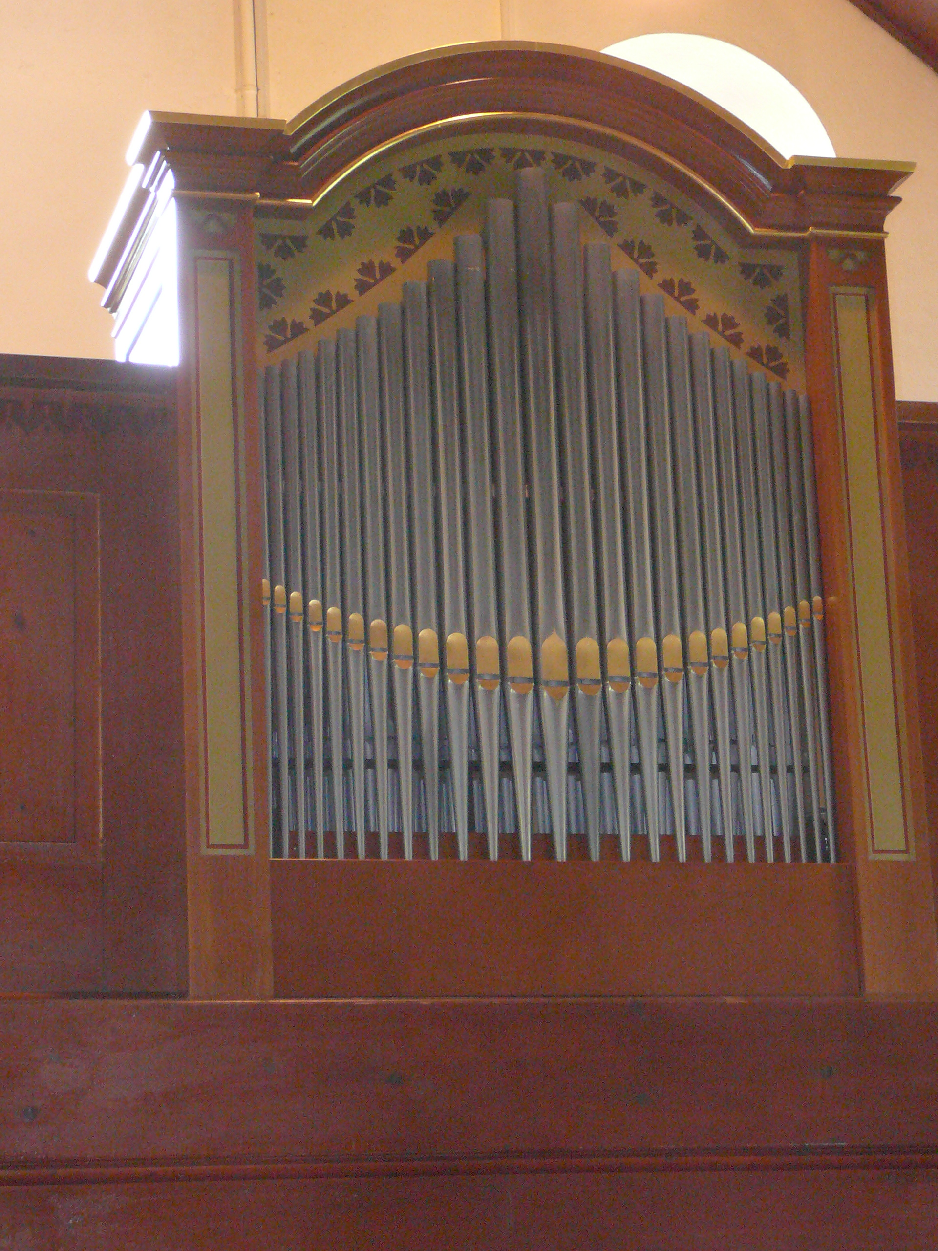 Römisch-katholische Kapelle St. Petrus Embrach Orgel